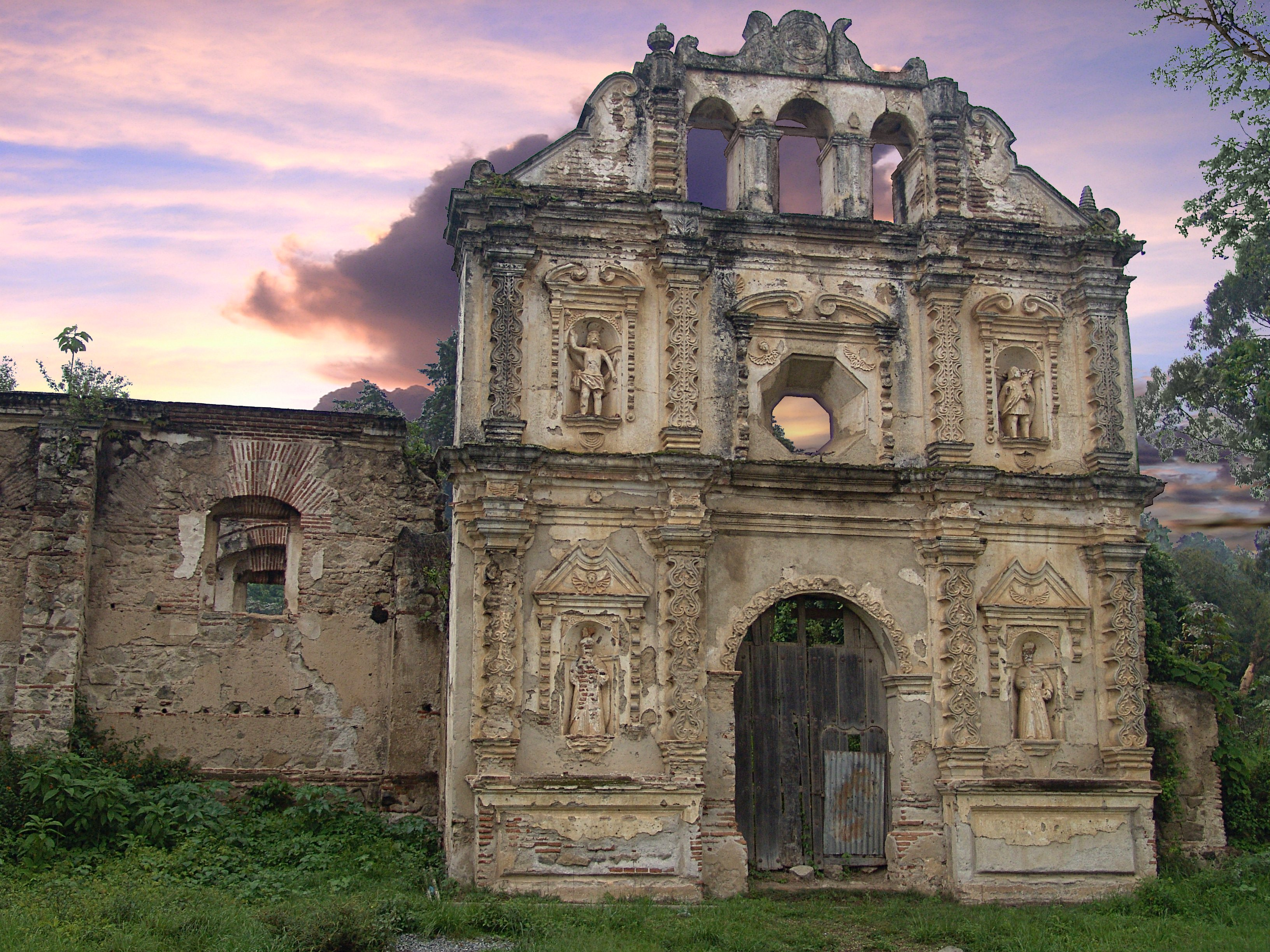 Atardecer en la Ermita de Santa Isabel, Antigua Guatemala. Fotografía de Zack Clark.